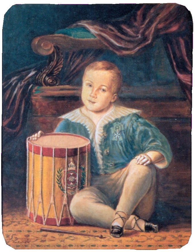 Pedro de Alcântara, later Pedro II of Brazil